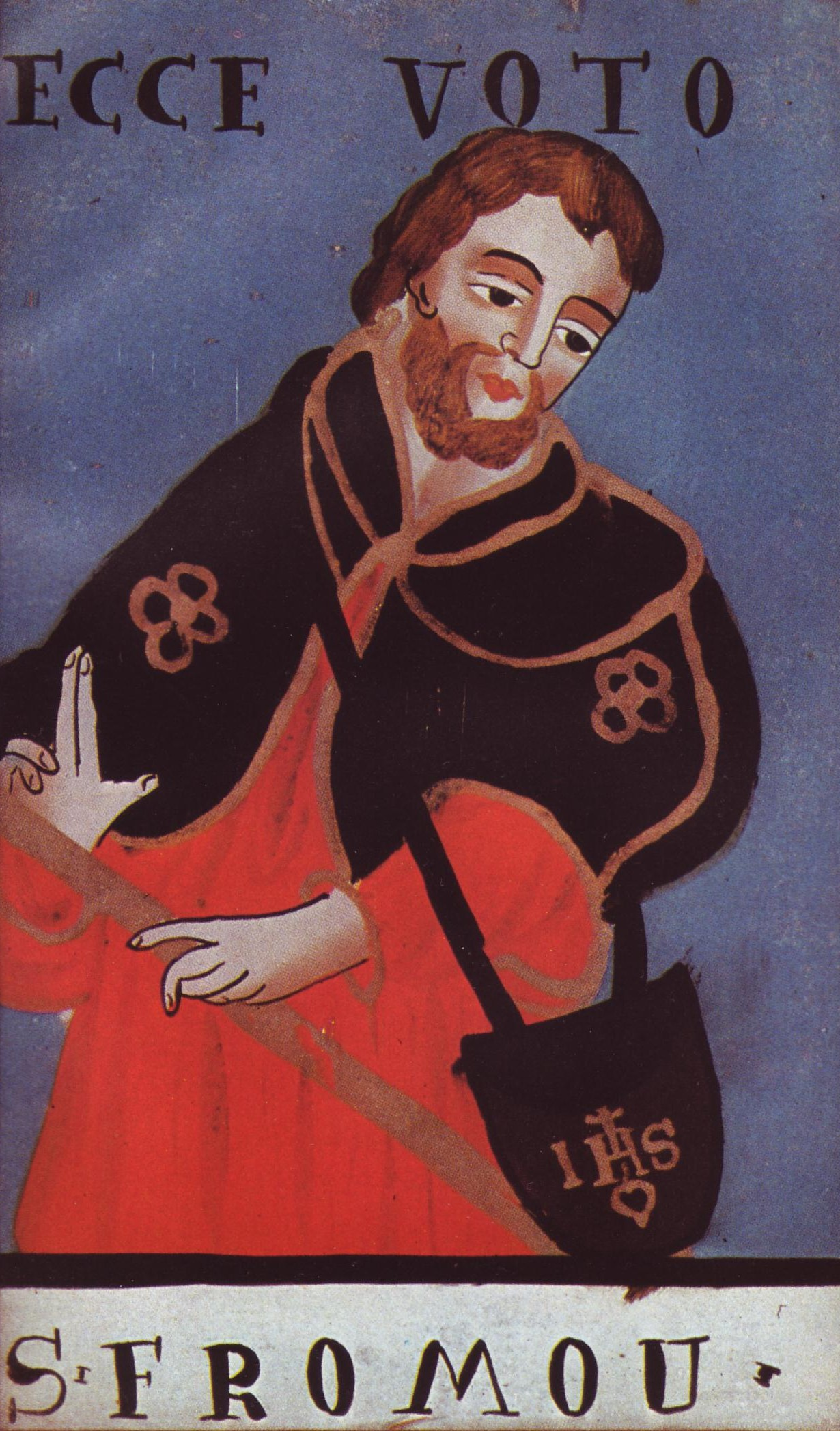 Ex-voto du XVIIe siècle de Saint Fromond, ermite de Bonfol (Jura Suisse)